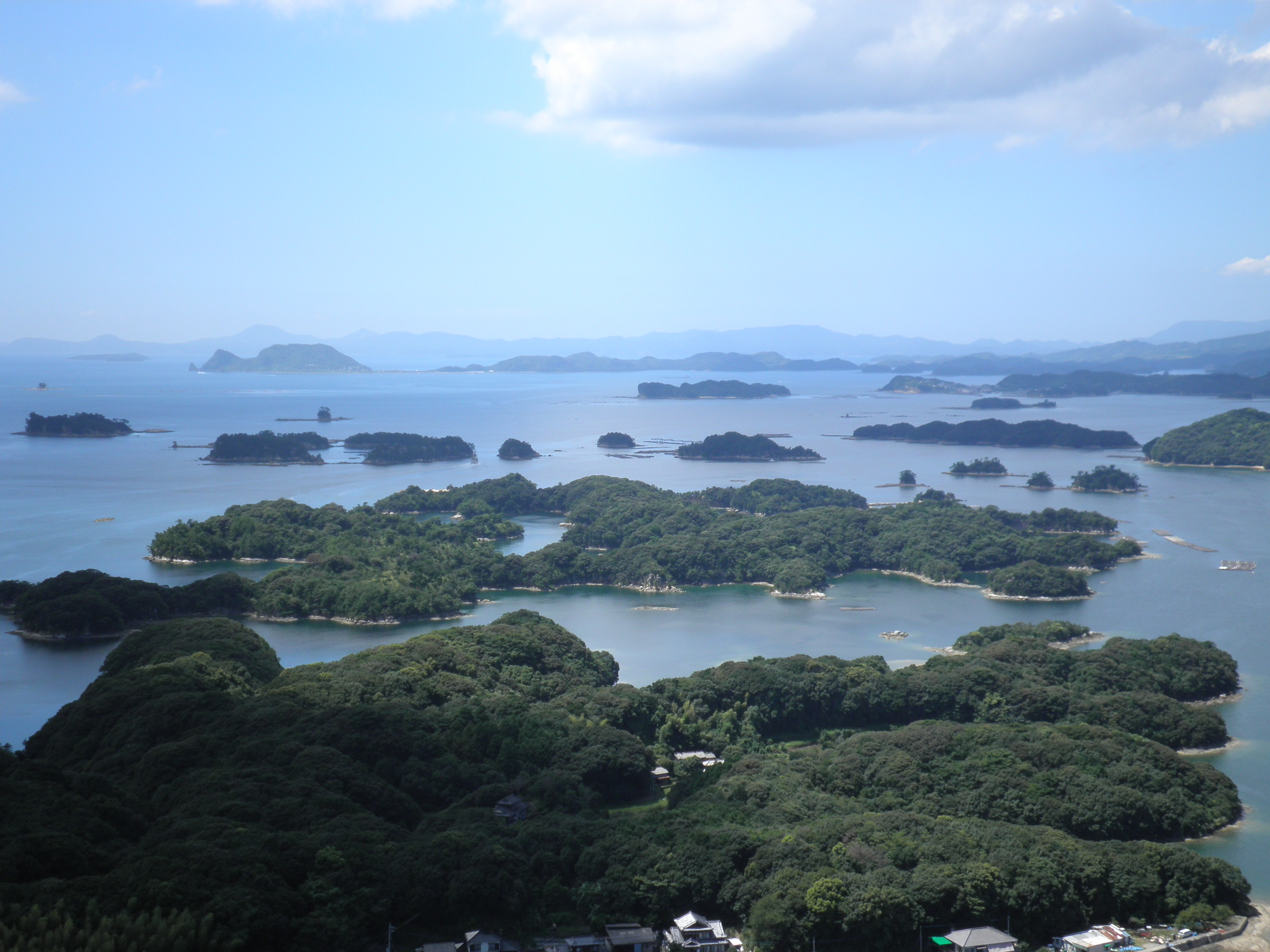 佐世保市の九十九島